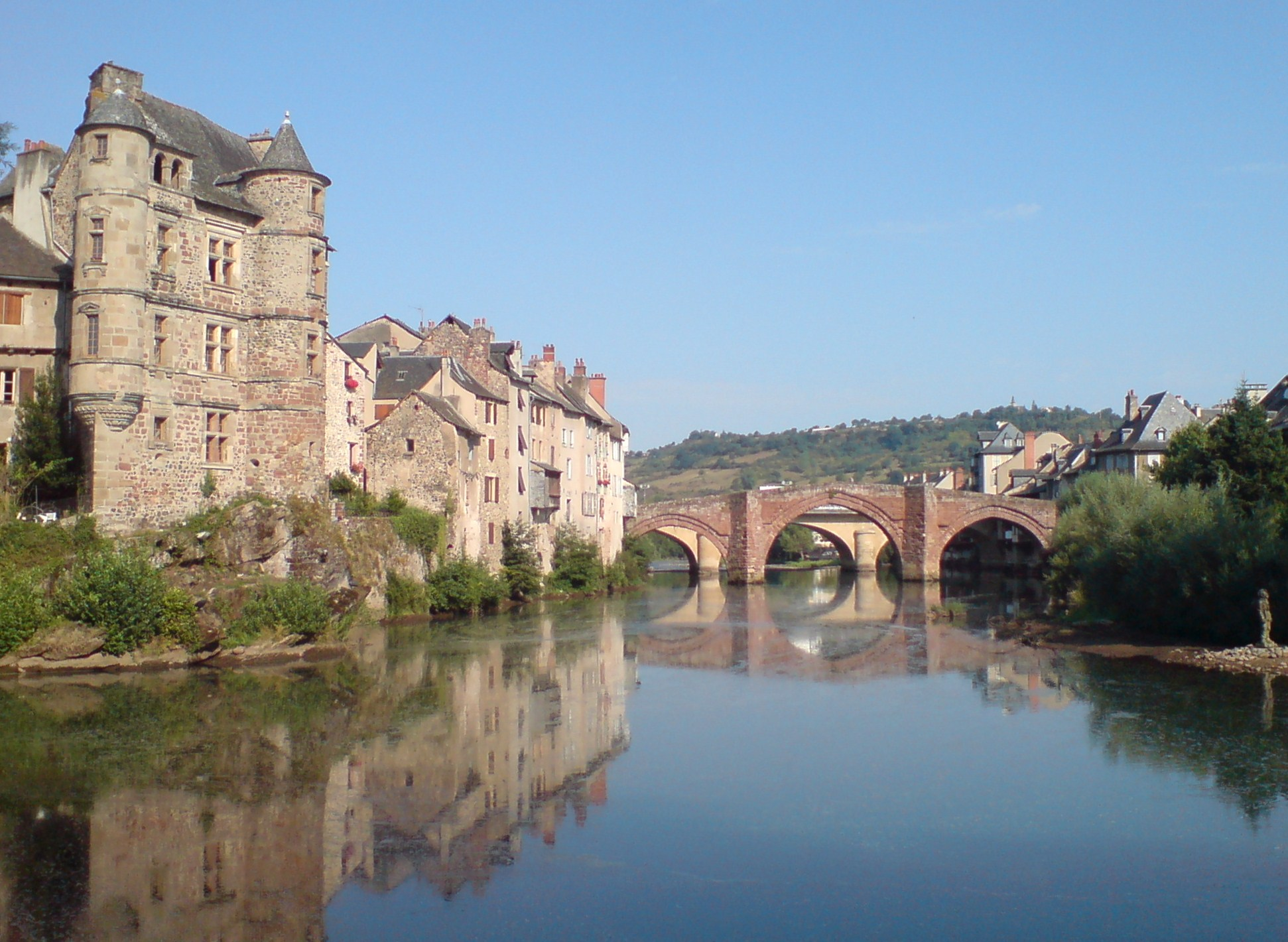 Vue d'Espalion (Aveyron, France) depuis la place du camping (ou du marché).